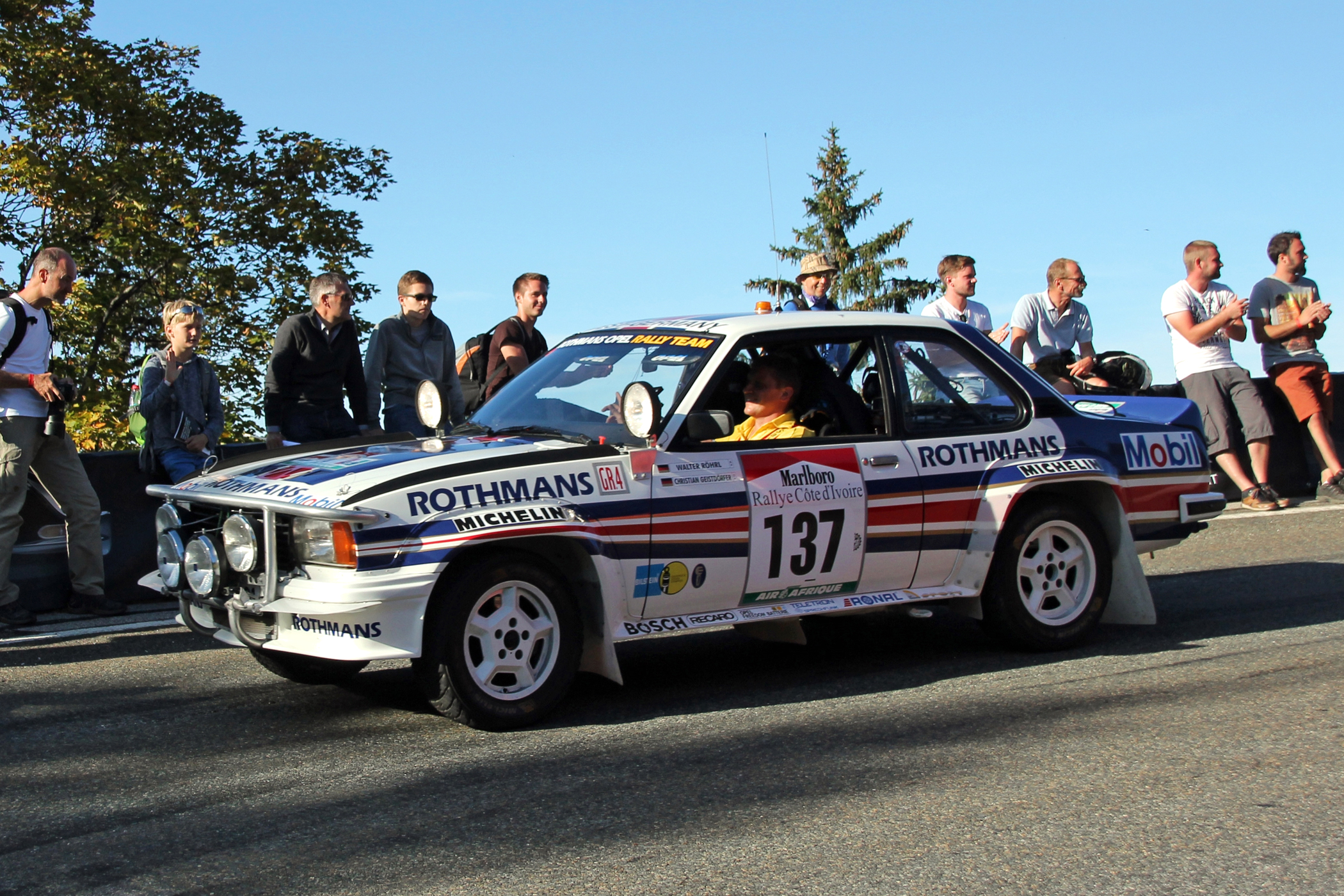 Walter Röhrls Gruppe 4 Opel Ascona 400 - eingesetzt bei der Rallye Elfenbeinküste in der Rallye-WM 1982